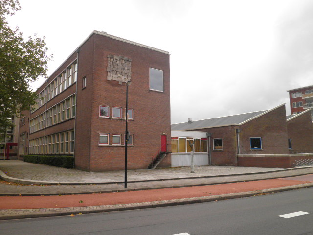 Voormalige TSH in Hoorn. Pand is gemeentelijk monument vanwegen het tanddak aan de achterzijde van het pand. Pand is nu in gebruik als bedrijfspand door verschillende bedrijven.